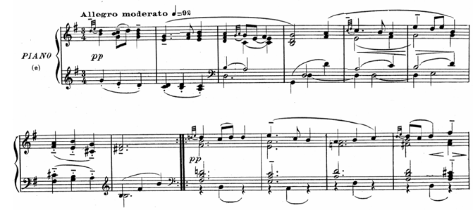 Beschreibung: 12 Takte aus Maurice Ravels Menuett aus "Le Tombeau de Couperin" Quelle: Maurice Ravel, gezeichnet von Boris Fernbacher Fotograf / Zeichner: Boris Fernbacher 07:02, 6. Jan 2006 (CET) Andere Versionen: Lizenz der Musik Kurzauszug zitiert nach Zitatrecht. Musik wird am 1.1.2008 gemeinfrei durch Alter (Ravel: † 1937). Lizenz des Notenbilds